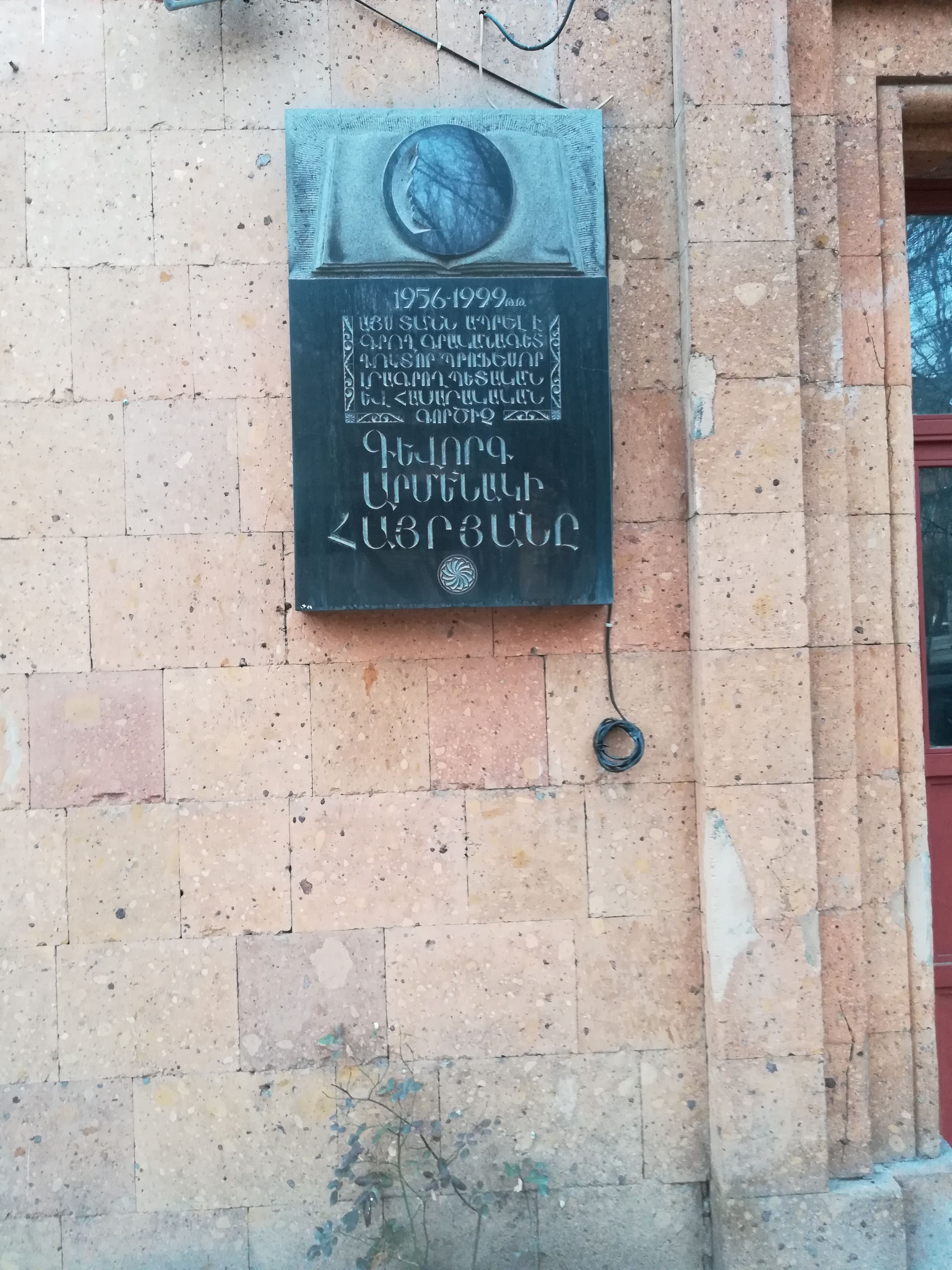 Ереван